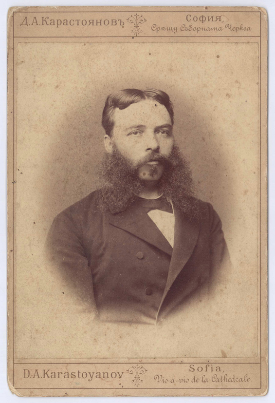 Български Георги Странски (1847-1904) е български лекар, революционер и политик. Deutsch Georgi Stranski (1847-1904) war ein bulgarischer Arzt, Revolutionär und Politiker English Georgi Stranski was Bulgarian politician, foreign minister of Bulgaria from 1. September 1887 until 16. Juni 1890